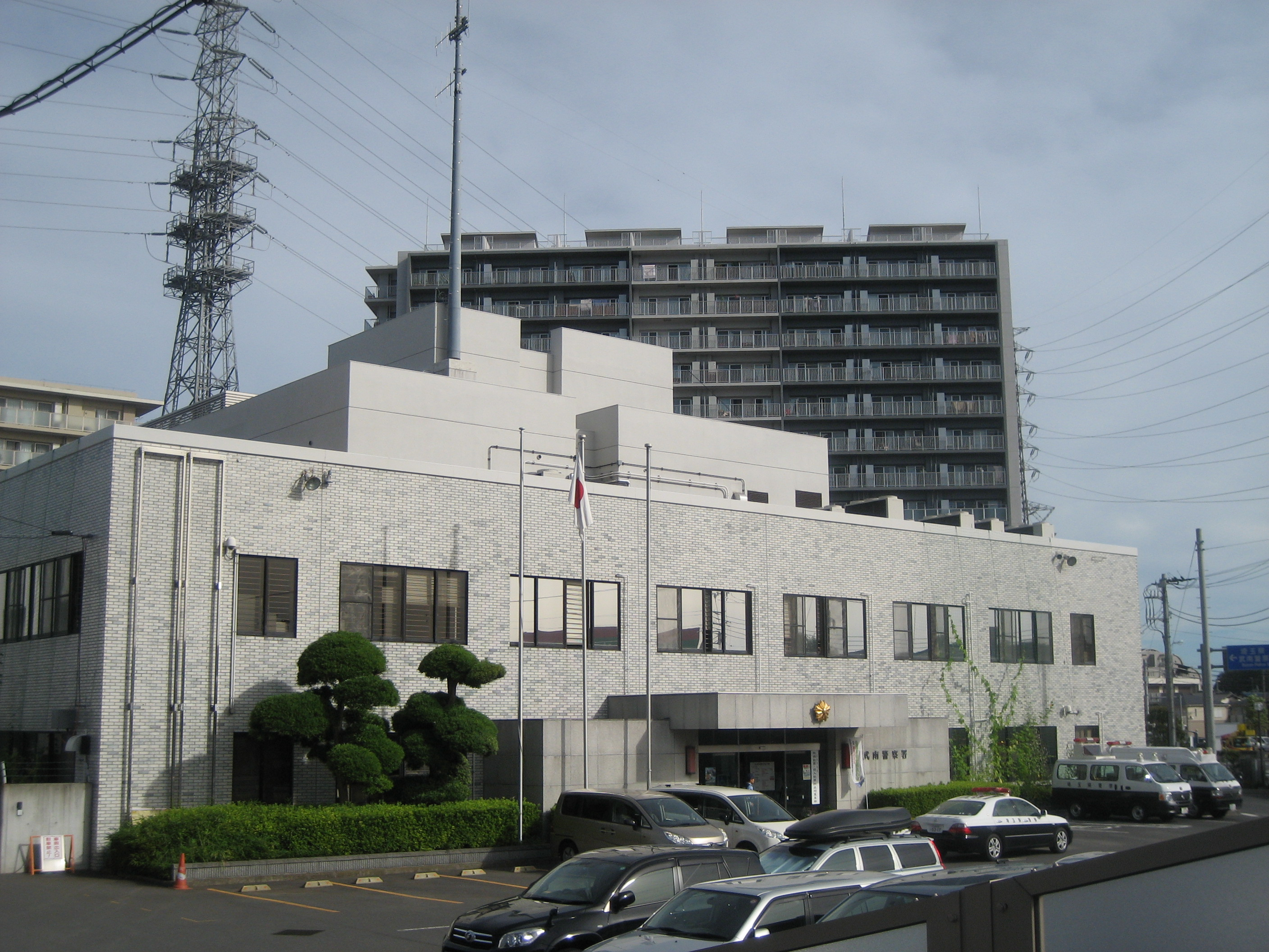 埼玉県武南警察署庁舎